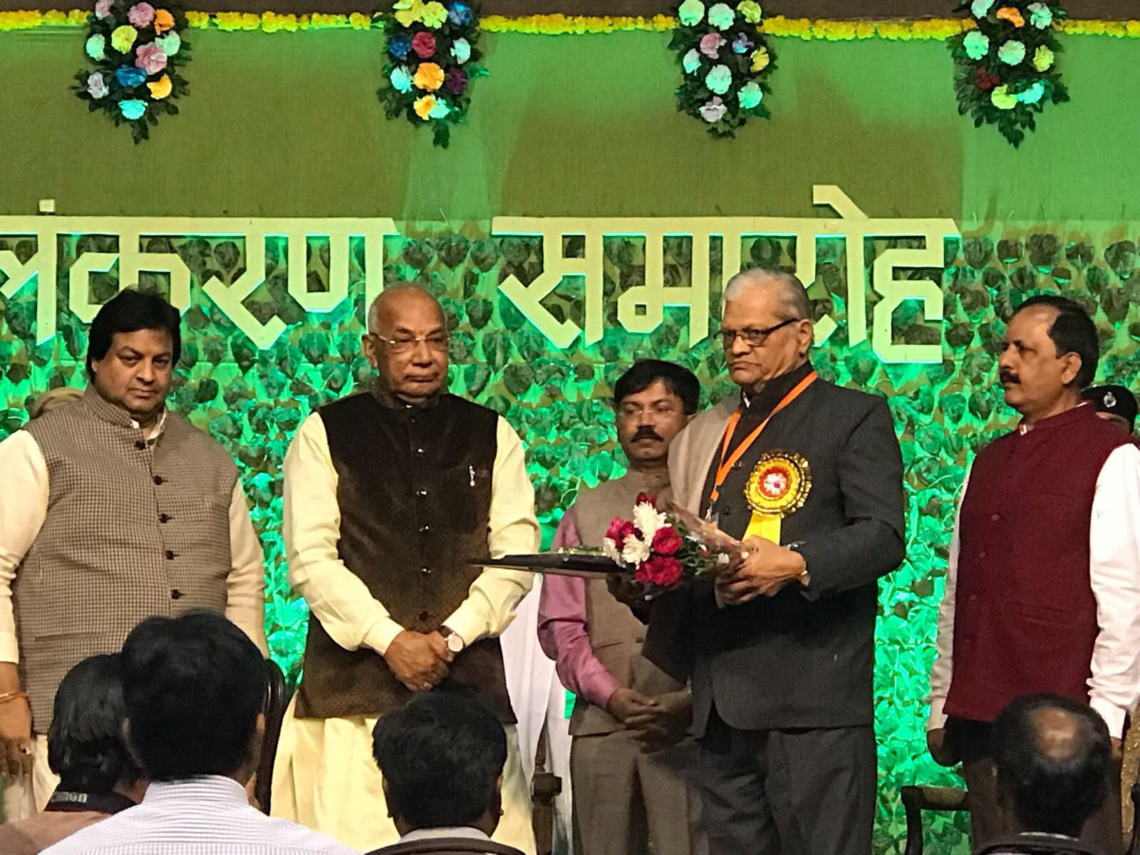 डॉ. हरि जोशी अखिल भारतीय वीरसिंह देव पुरस्कार ग्रहण करते हुए, दिसम्बर २०१७